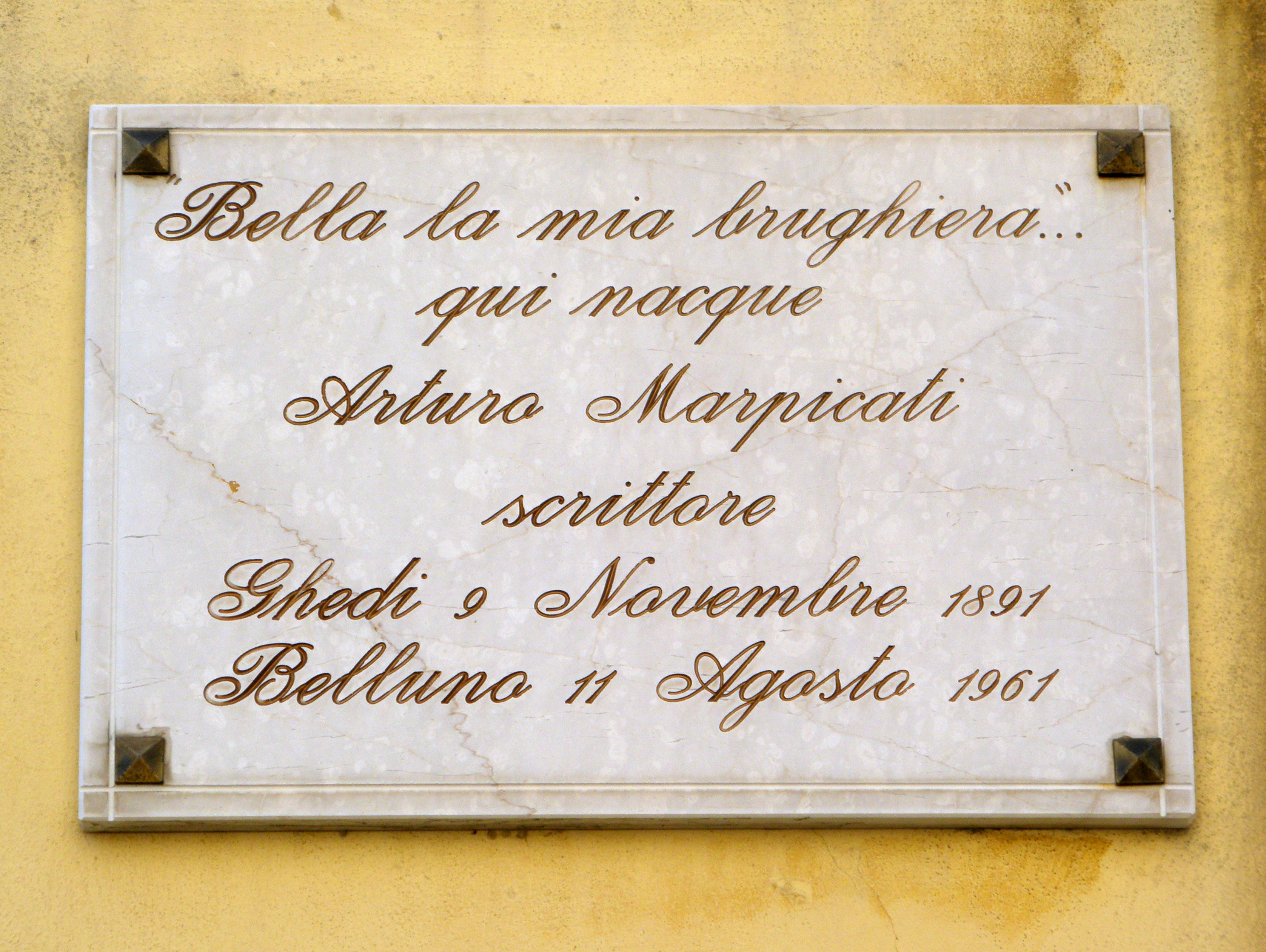 Ghedi, Via Trento: lapide murata sulla facciata dell'abitazione dove nacque lo scrittore Arturo Marpicati.